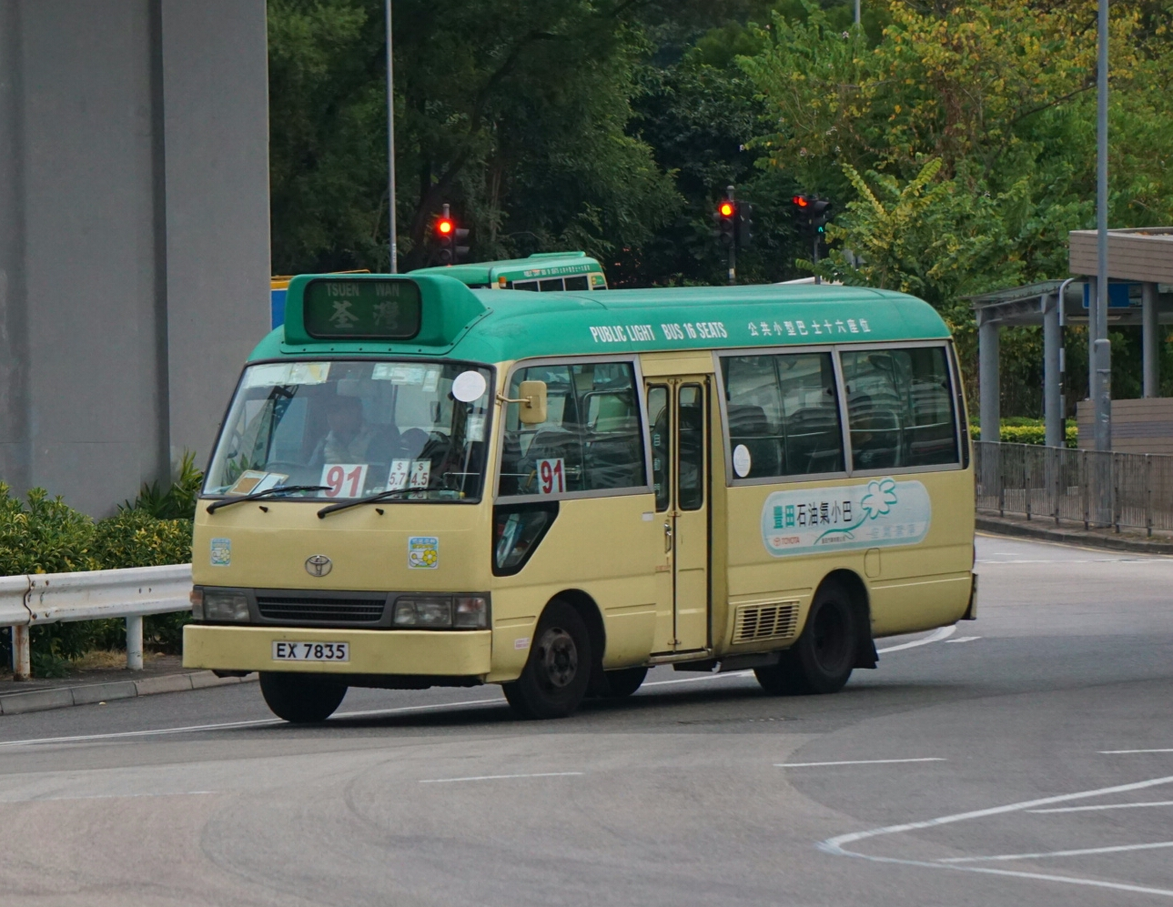 中文（香港）: 新界區專線小巴91線，正途經葵福路近貨櫃碼頭路交匯處